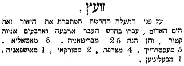 פירוט מעבר האניות בתעלת סואץ בראשית דרכה